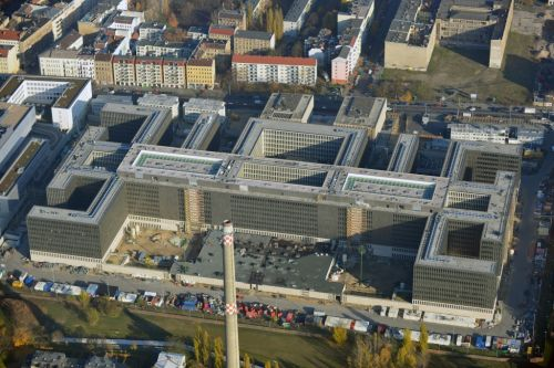 BERLIN MITTE 14.11.2012 Blick auf die Baustelle des Neubaus der BND-Zentrale an der Chausseestraße im Bezirk Mitte der Hauptstadt Berlin. Der Bundesnachrichtendienst (BND) baut auf einem ca. 10 Hektar großen Gelände für rund 4.000 Mitarbeiter. Das Gebäude wird nach Plänen des Berliner Architektenbüros Kleihues + Kleihues errichtet. // View of the construction site to the new BND headquarters at Chausseestrass in the district Mitte. The Federal Intelligence Service (BND) builds on a 10 acre site for about 4,000 employees. It is built according to plans by the Berlin architects offices Kleihues + Kleihues.